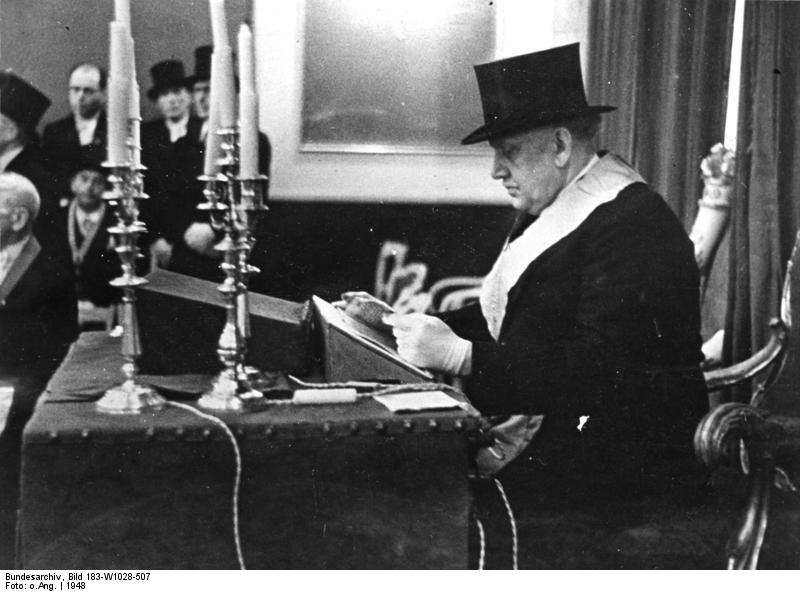 Erlangen, Freimaurer bei Zeremonie Illus/dpd Westdeutschland: Im Mai 1948 fand zum ersten Mal nach dem Verbot durch die Nazis im Gebäude der Erlanger Freimaurerloge "Libanon zu den 3 Zedern" der erste Großlogentag "Zur Sonne" statt. Die im Jahre 1741 gegründete Großloge gehört zu den größten deutschen Logen. Amerika, Frankreich und die Tschechoslowakei entsandten Vertreter. - Ein Stuhlmeister während einer Zeremonie in der Großloge 1496-48